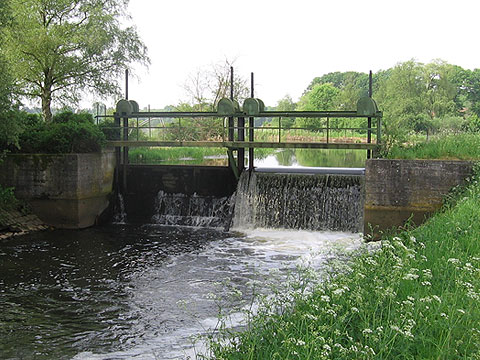 Wehr im Wapelbach in Gütersloh-Kattenstroth in der Nähe des Wapelbads. Das Bild wurde bei 51° 53′ 32″ N, 8° 20′ 17″ O aufgenommen.